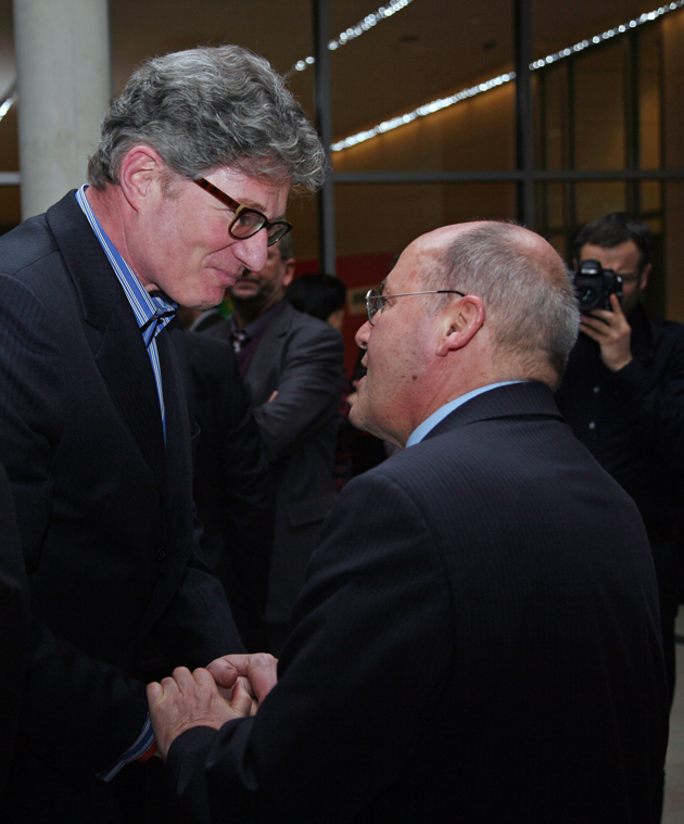 Geburtstagsempfang zum 65. von Gregor Gysi im Reichstagsgebäude